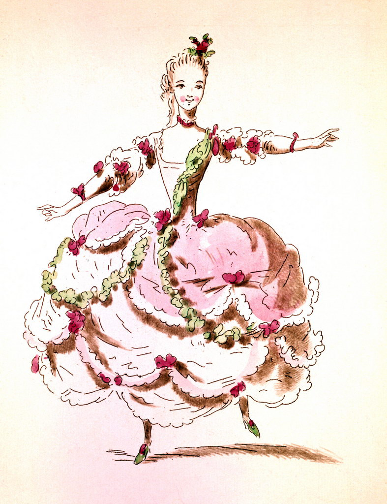 Мари-Мадлен Гимар, балерина XVIII столетия в балете «Зелиндор - король эльфов».